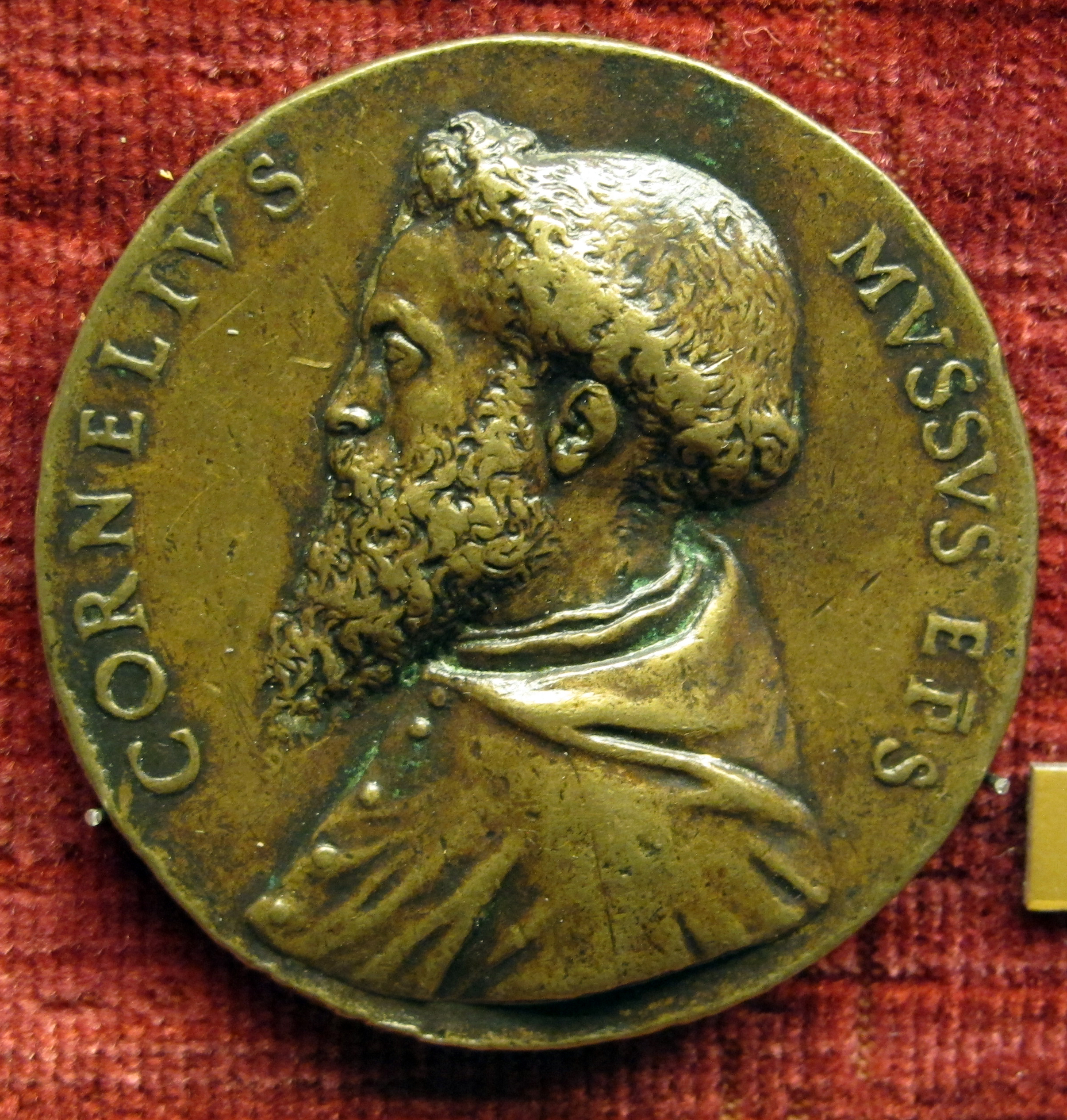 Cornelio Musso (1511-1574), medaglia di autore anonimo